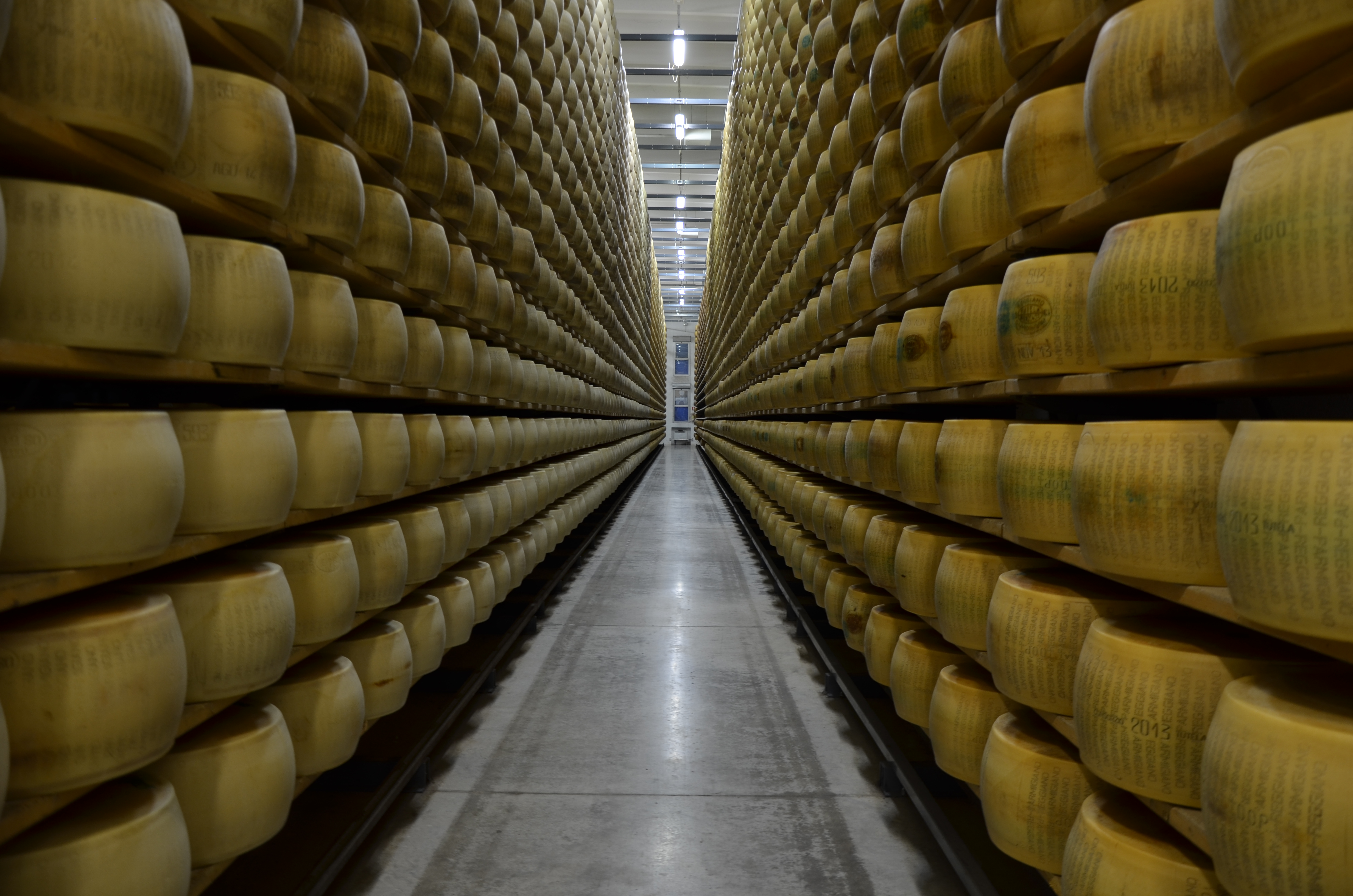 parmigiano